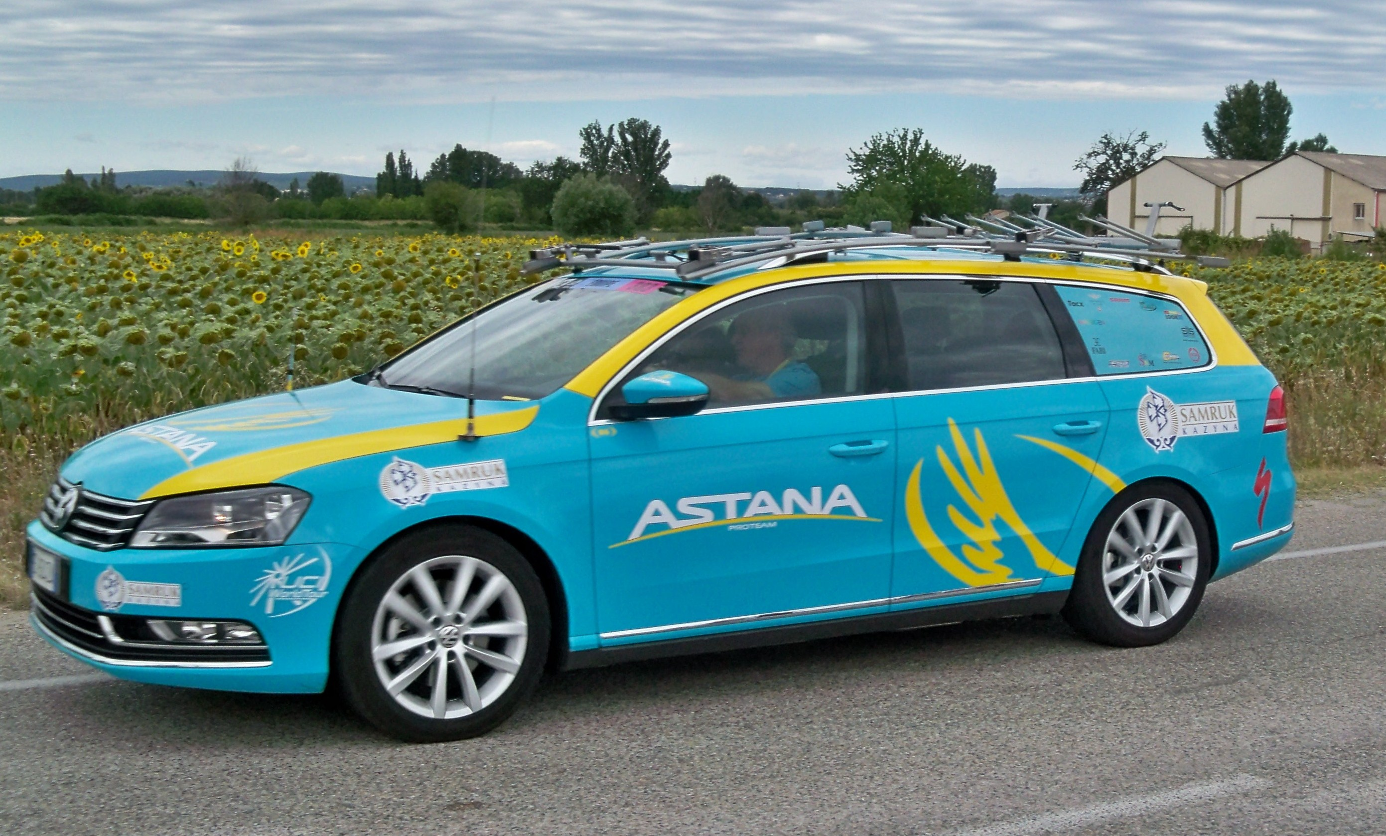 véhicule de l'équipe Astana, étape 13 du Tour de France 2012